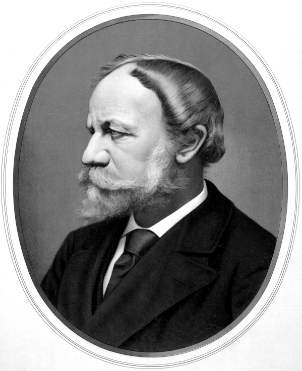 Jókai Mór portré